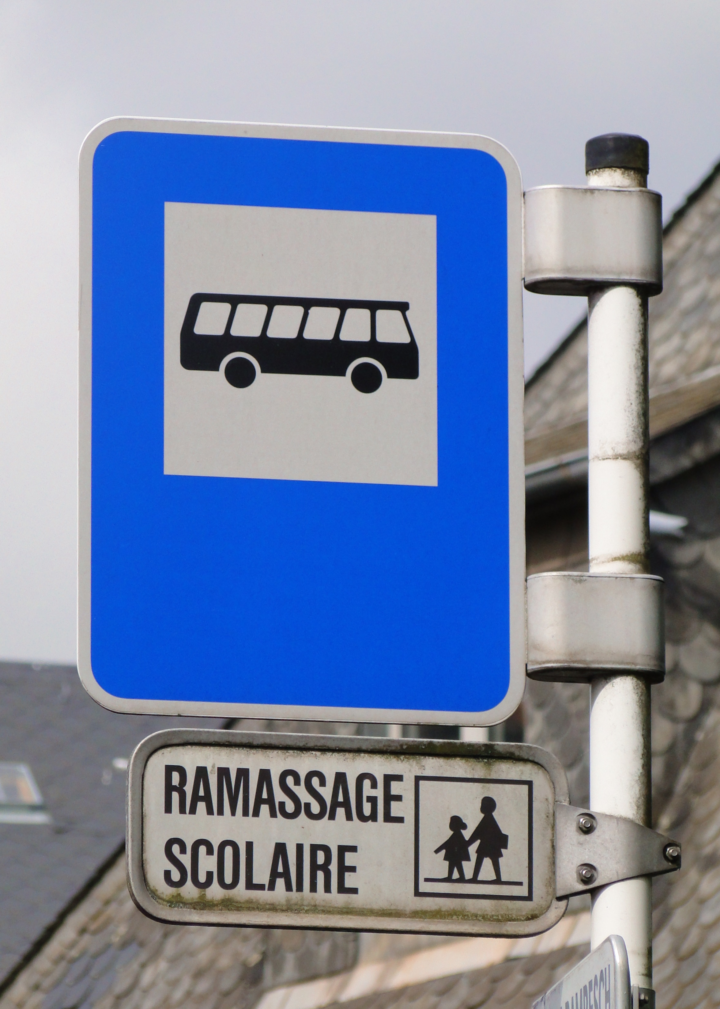 Verkéiersschëld E,19 aus dem Lëtzebuerger Code de la route mam Zousazschëld Modell 9